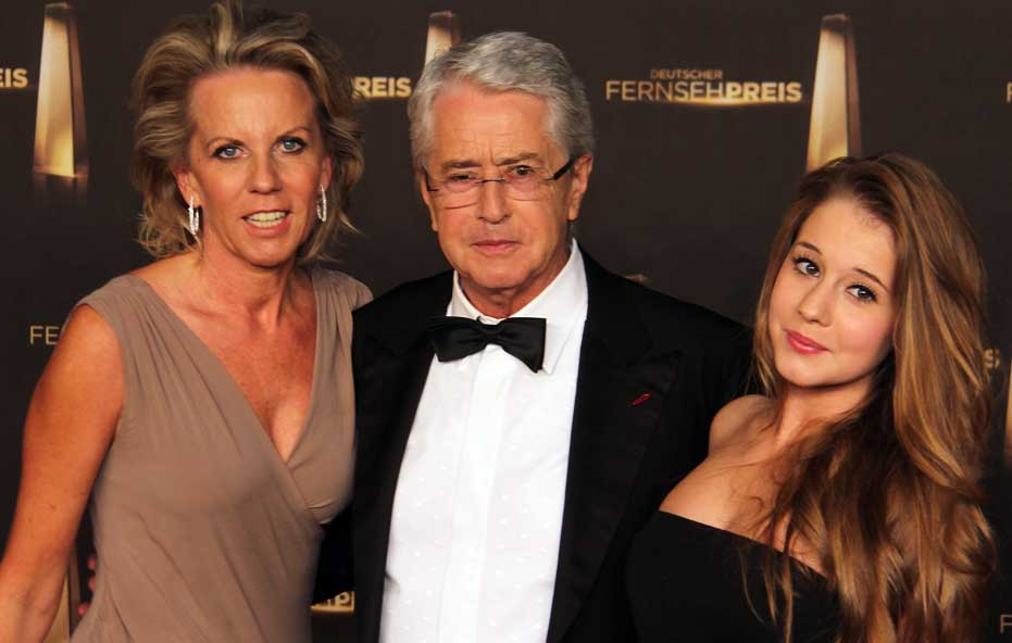 Ehrenpreisträger Frank Elstner mit Ehefrau und Tochter beim Deutschen Fernsehpreis 2012